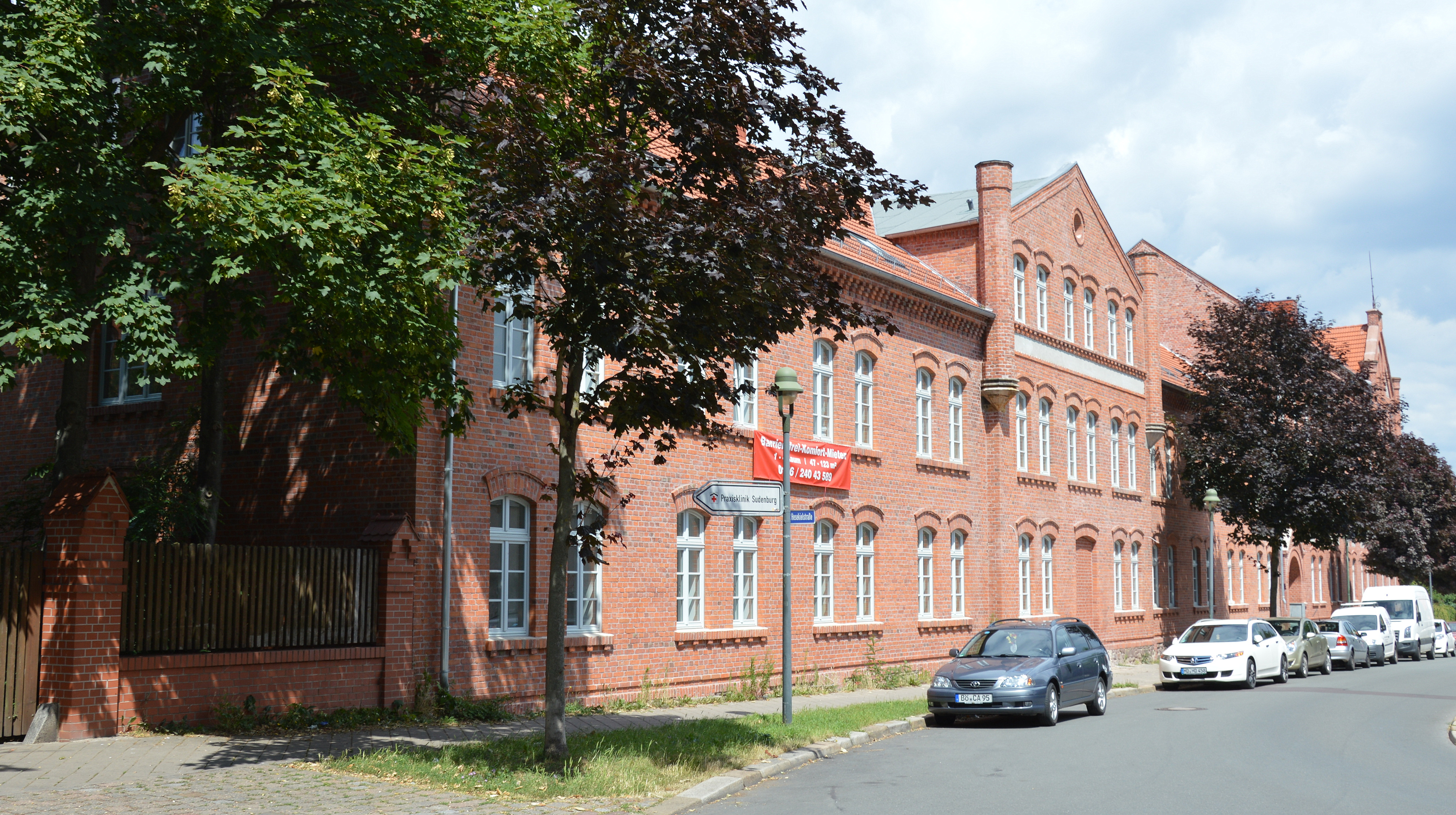 Wohnheim Hesekielstraße